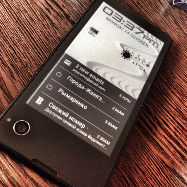 E-ink сторона Yotaphone. Обои с часами, погодой, батарейкой и нотификациями.